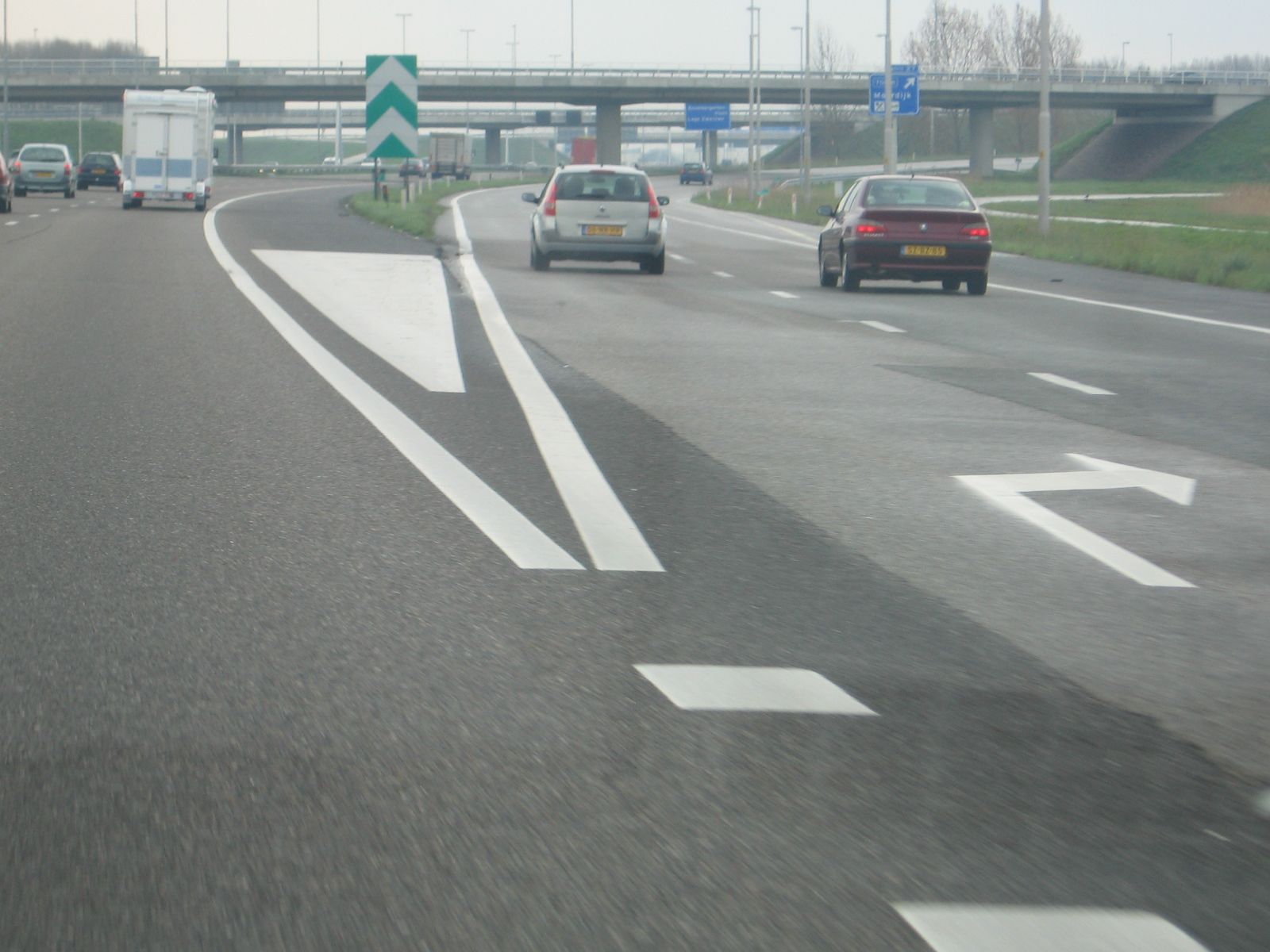 Puntstuk